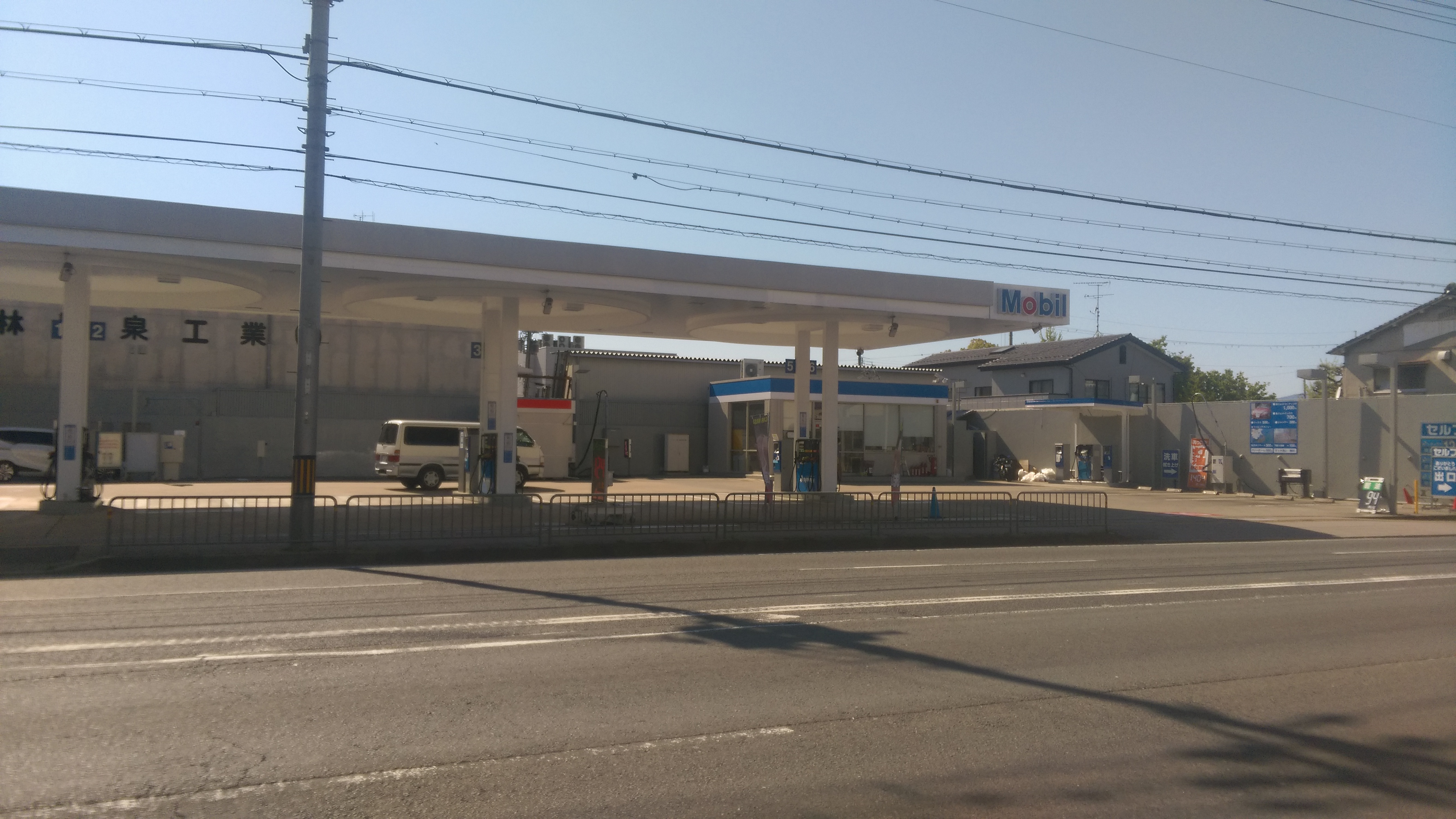 モービル 木村石油下鳥羽SS 京都市伏見区